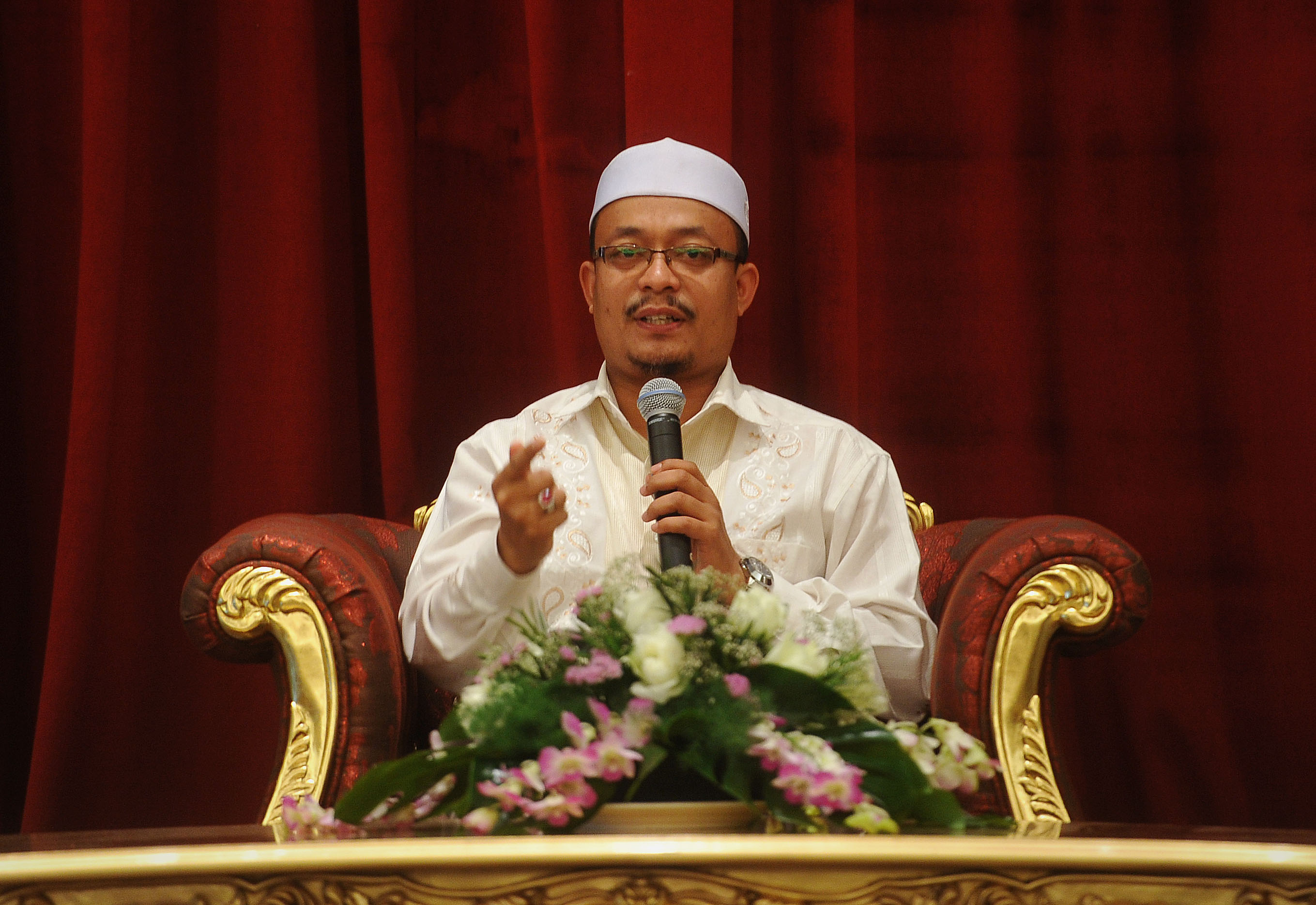 Ustaz Kazim Elias